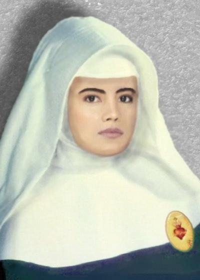 Desenho alusivo à Soror Joana Angélica, mártir da Independência da Bahia (1821).